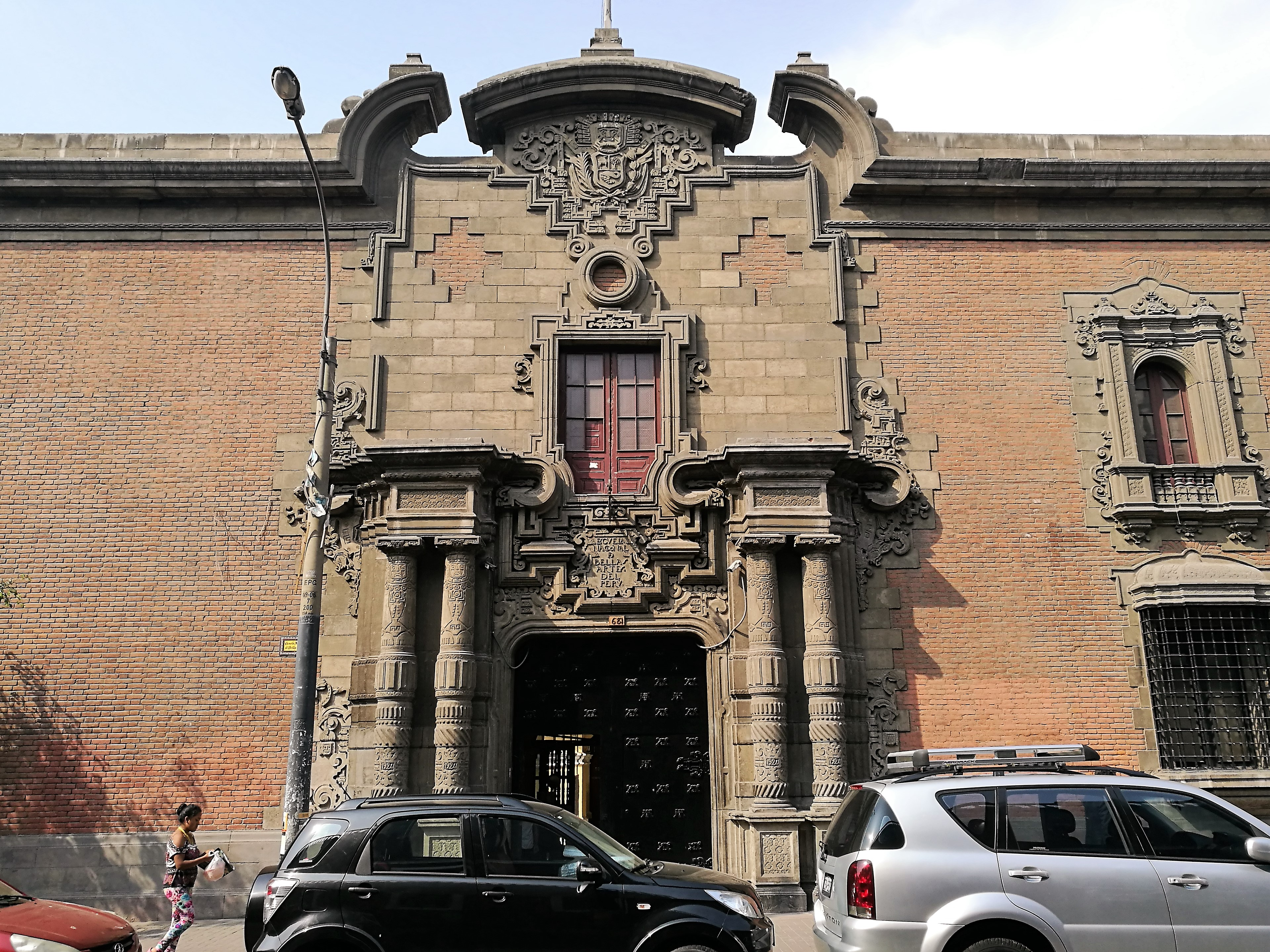 Escuela Nacional de Bellas Artes a Barrios Altos, Lima